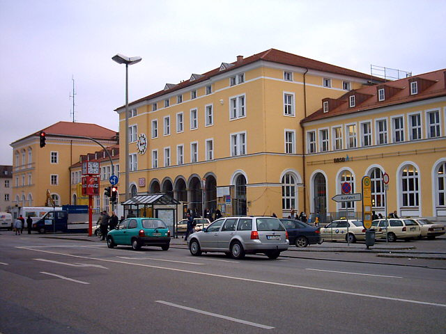 Regensburg (Bayern): Der neu renovierte Hauptbahnhof. Er wurde fast vollständig entkernt, die alte Bahnhofswirtschaft wich zum Leidwesen Vieler der Fastfood-Kultur... Mehr Bilder aus Regensburg: Ein Abend an der Donau bei der Steinernen Brücke... Als in Regensburg noch Straßenbahnen fuhren - Modell des Arnulfsplatzes um ca. 1960 Meditieren auf Rengschburgerisch: Der Spitalgarten in Stadtamhof an der Steinernen Brücke Das Wohnhaus des Astronomen Johannes Kepler und seiner Familie von 1626-1628 Der Goldene Turm Die Neugestaltung des Neupfarrplatzes Mitte der 90er-Jahre fand nicht nur ungeteilte Zustimmung... Der Brückturm neben dem Salzstadel (2) Die historische Wurstküche ("Wurstkuchl") am Marc-Aurel-Ufer Das Ostentor Das "Bruckmandl" (Brückenmännlein) in der Mitte der Steinernen Brücke Zeugl (bair. für "Aushängeschild") des historischen Lokals "Zum Walfisch" Regensburg (Bayern): Der Biergarten im Bischofshof neben dem Dom (2) Gedenktafel für Oskar Schindler, der nach dem Krieg in Regensburg wohnte Sitzung des Immerwährenden Reichstags in Regensburg im Jahr 1640